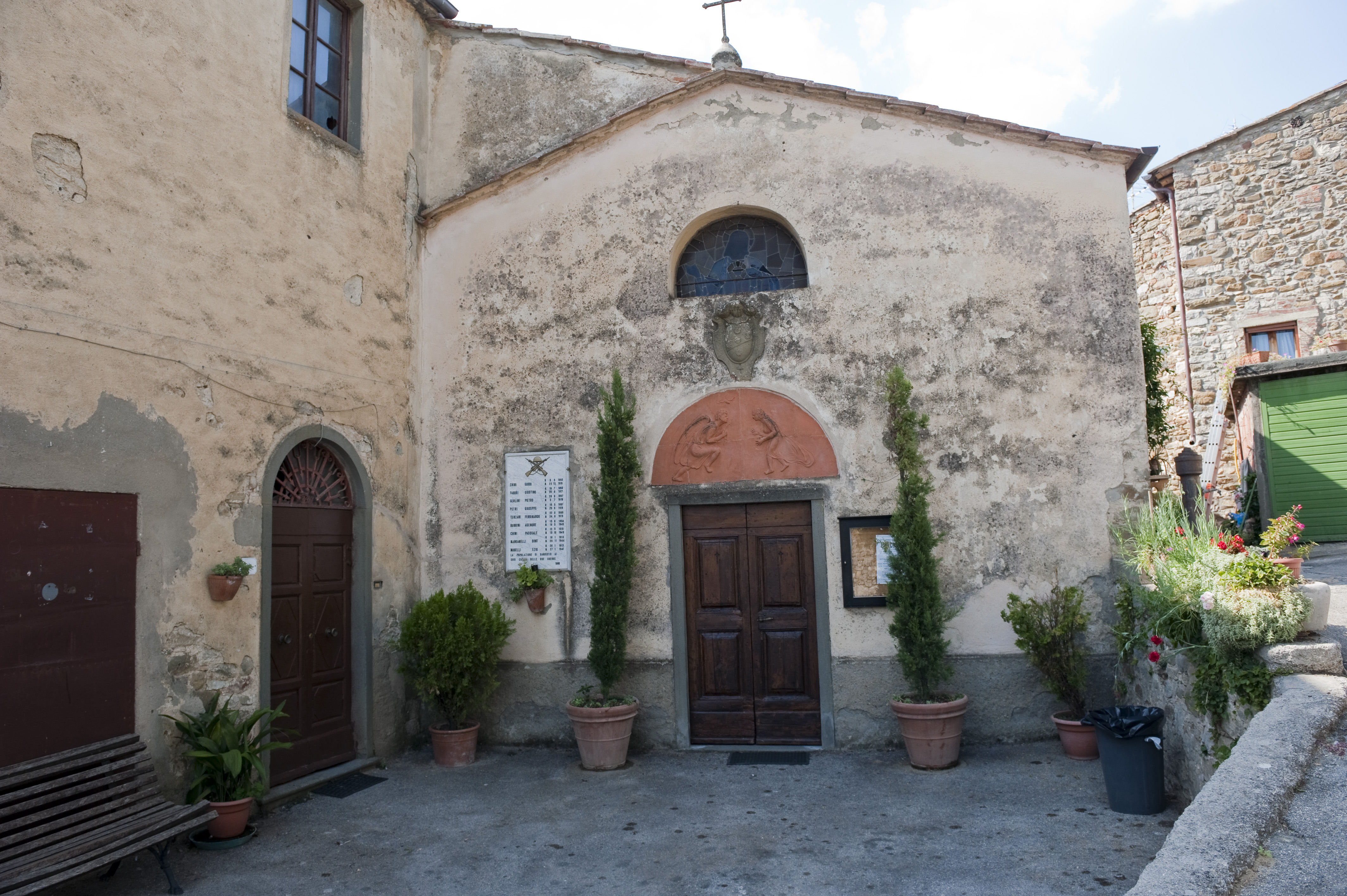 Chiesa di san Jacopo a Barbischio, Gaiole in Chianti